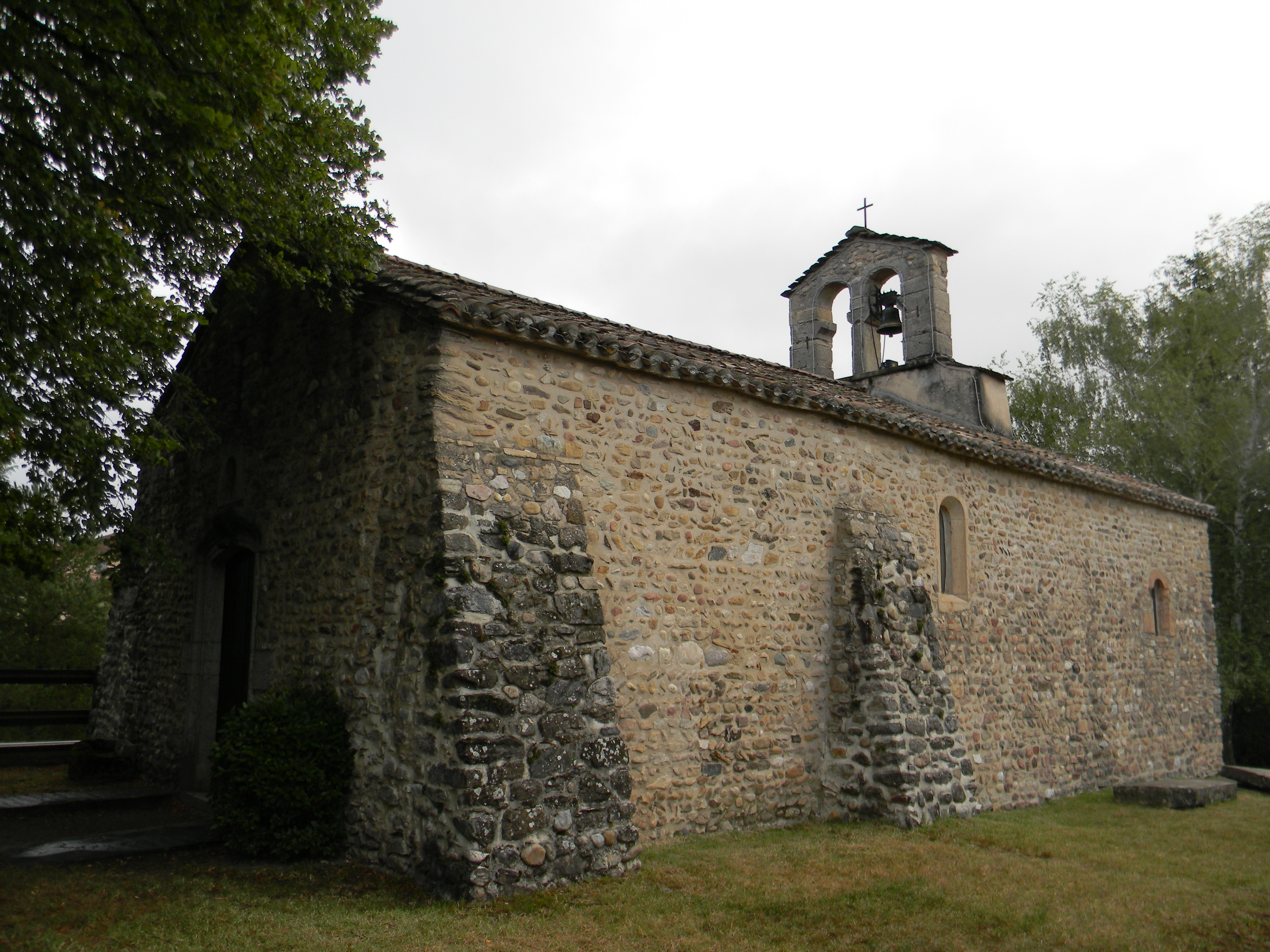 Chapelle de Chavagneux.